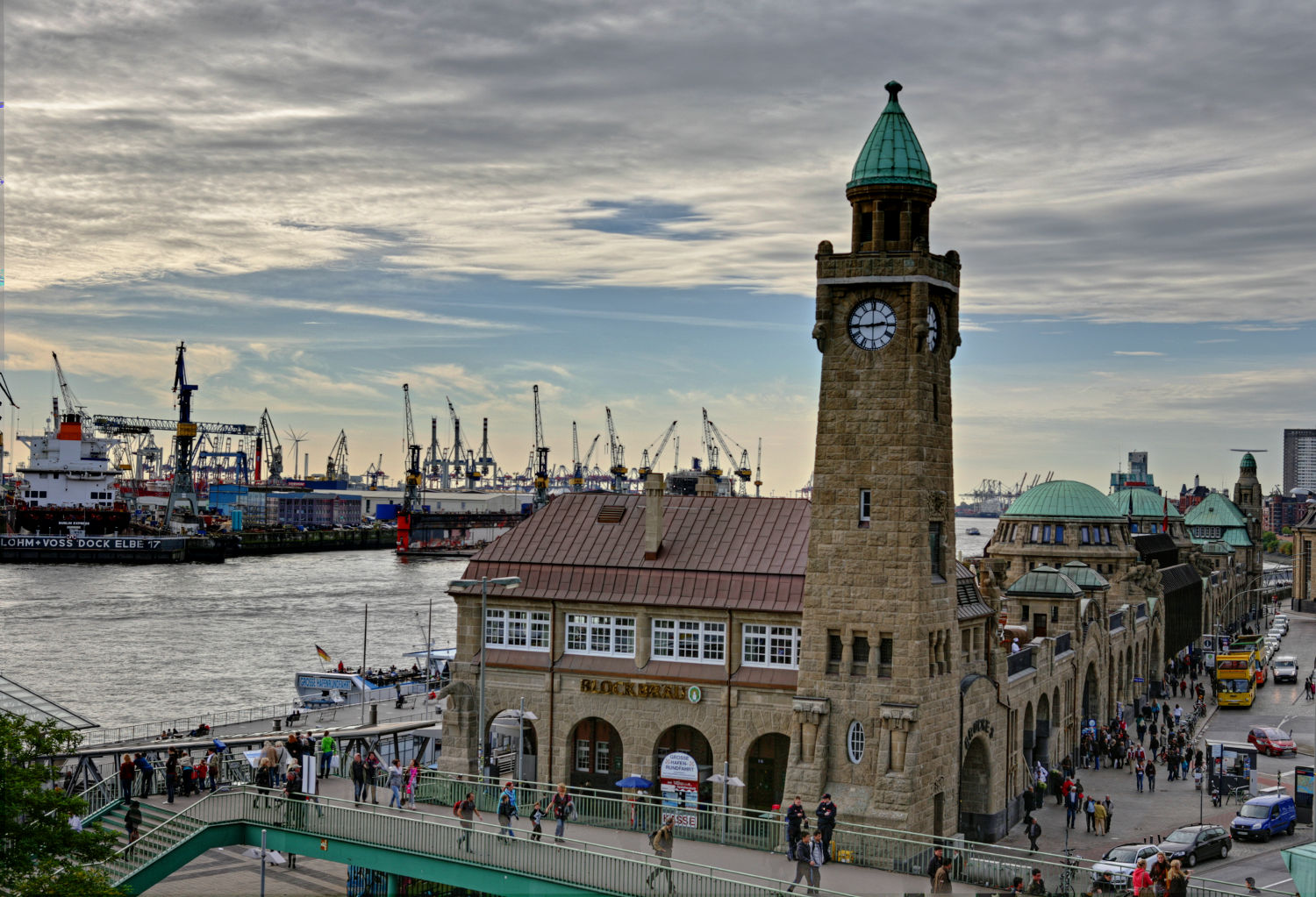 Hamburg Landungsbrücken